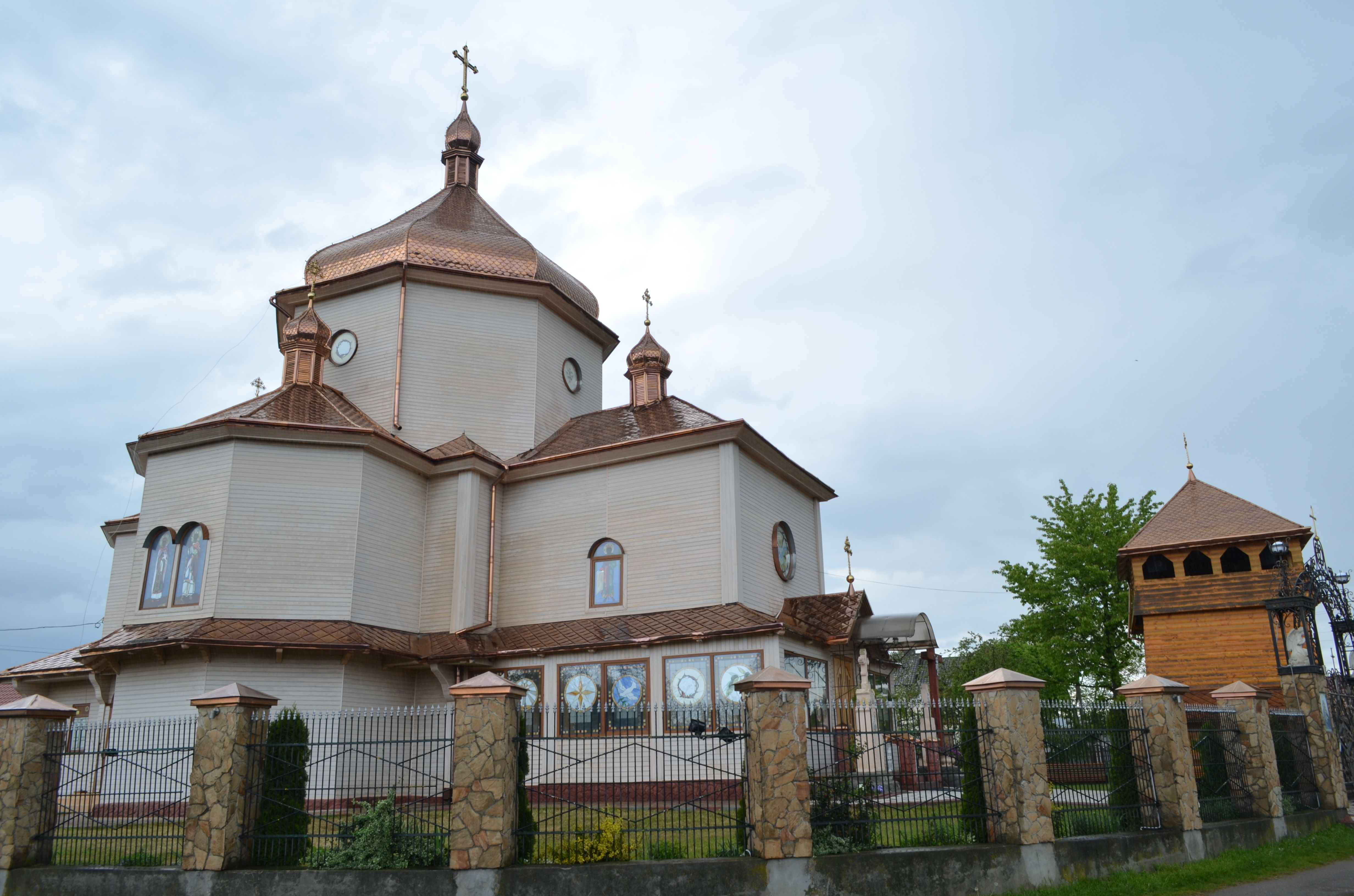 Дзвіниця Успення Пресвятої Богородиці (можливо, згоріла), с. Пісочна